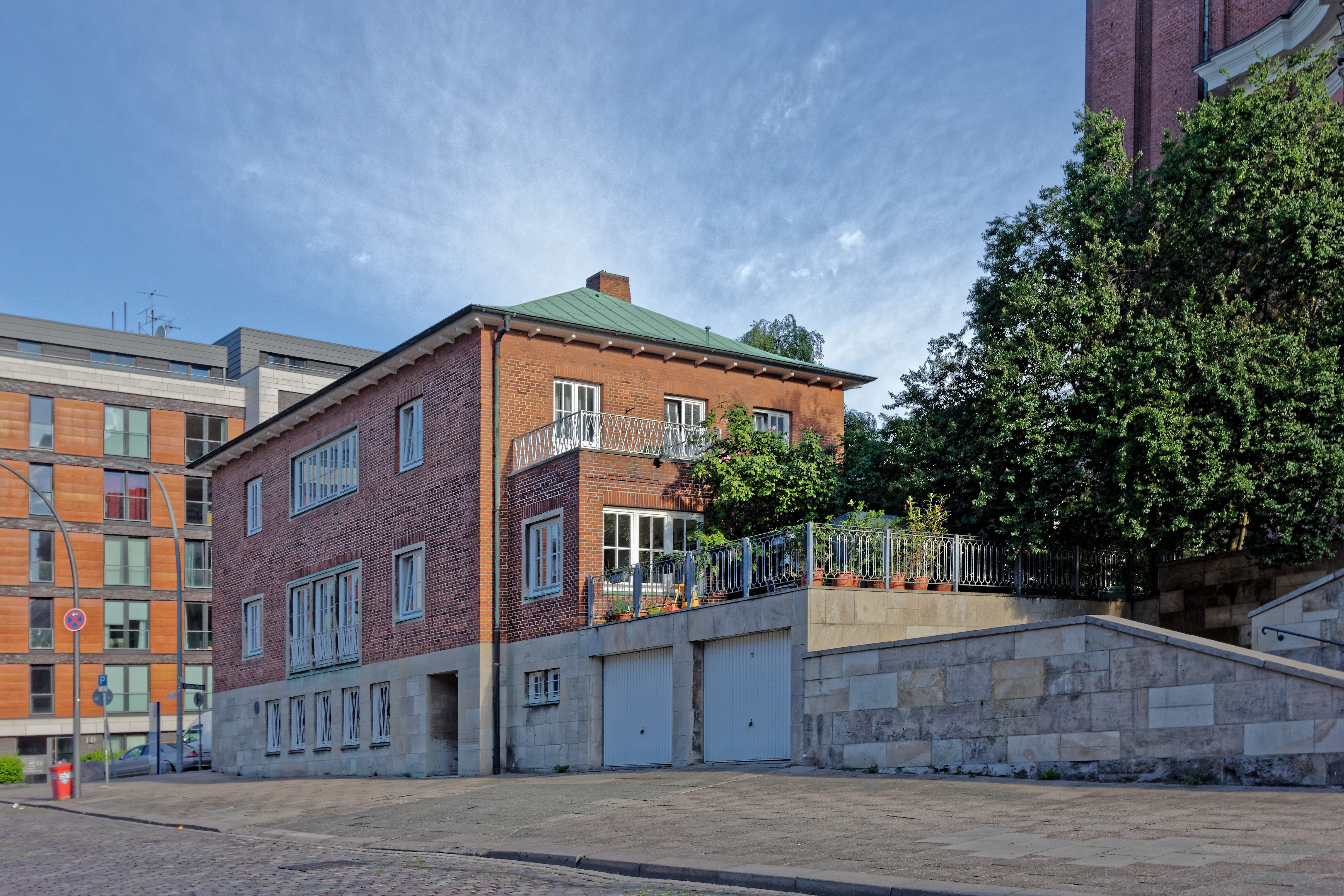 Hamburg, Gemeindehäuser Hauptkirche St. Michaelis, Englische Planke 9This is a photograph of an architectural monument.